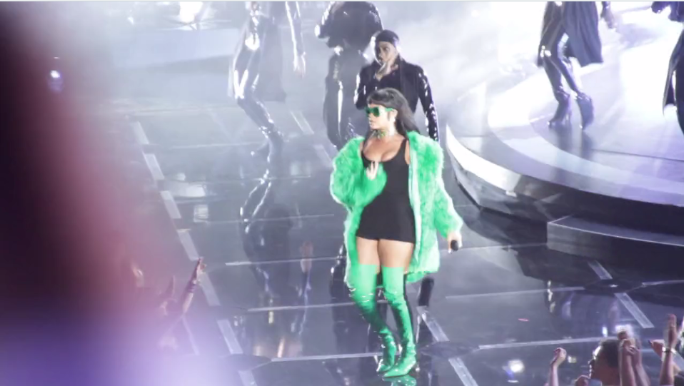 Rihanna perfoming at IHeartRadio Music Awards 2015